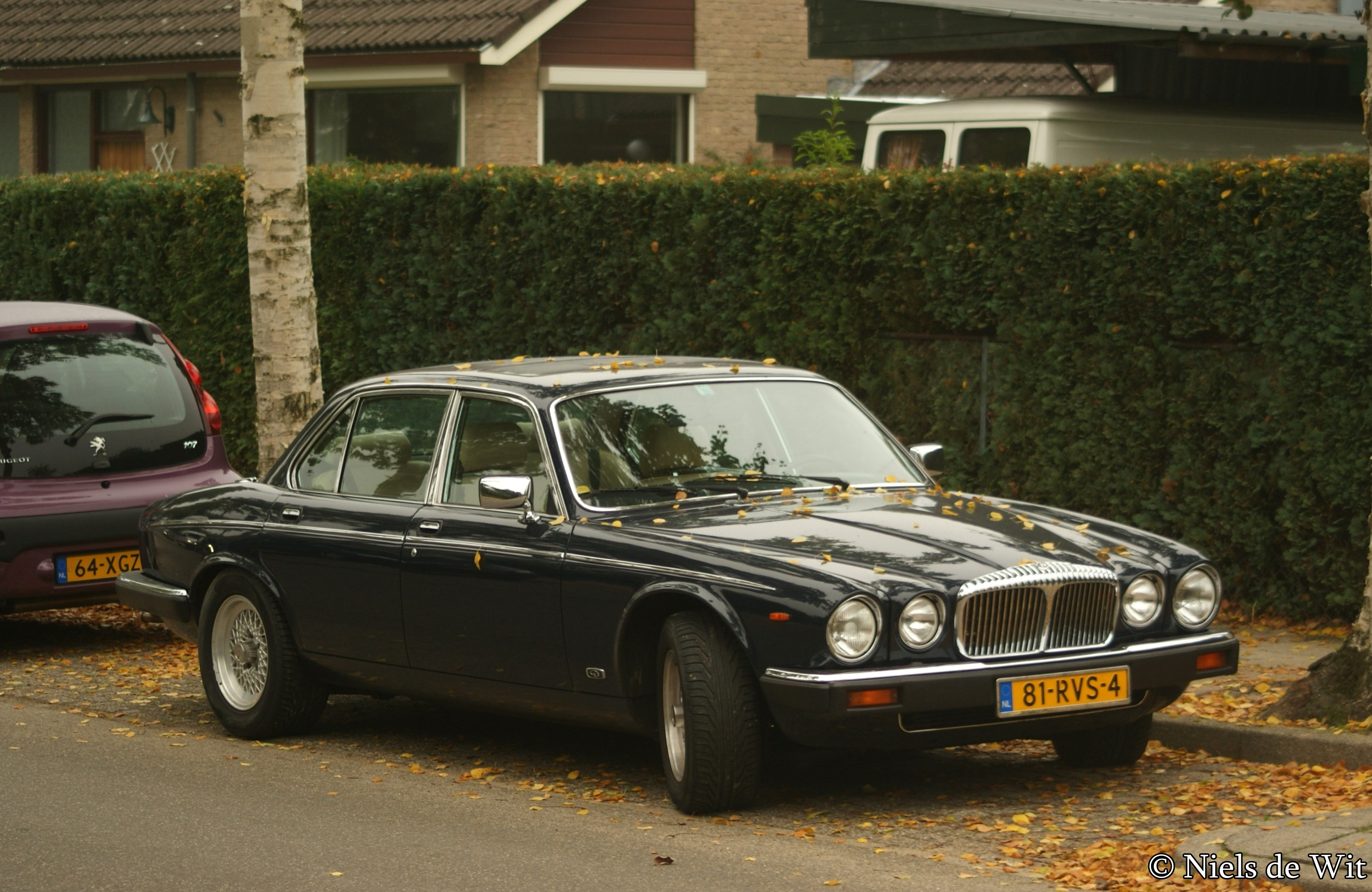 81-RVS-4